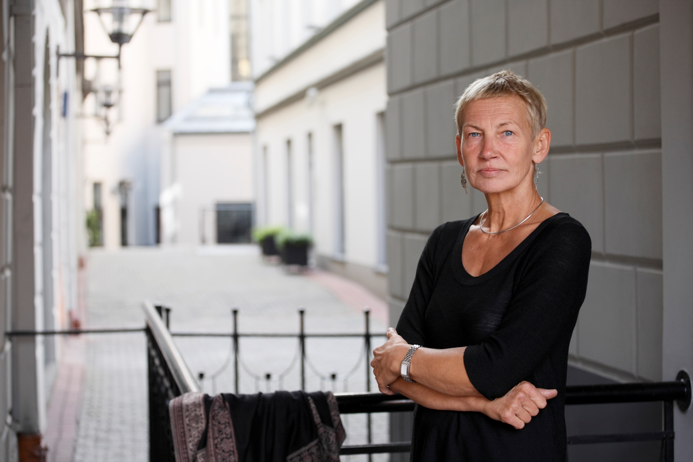 Arhitekte Zaiga Gaile